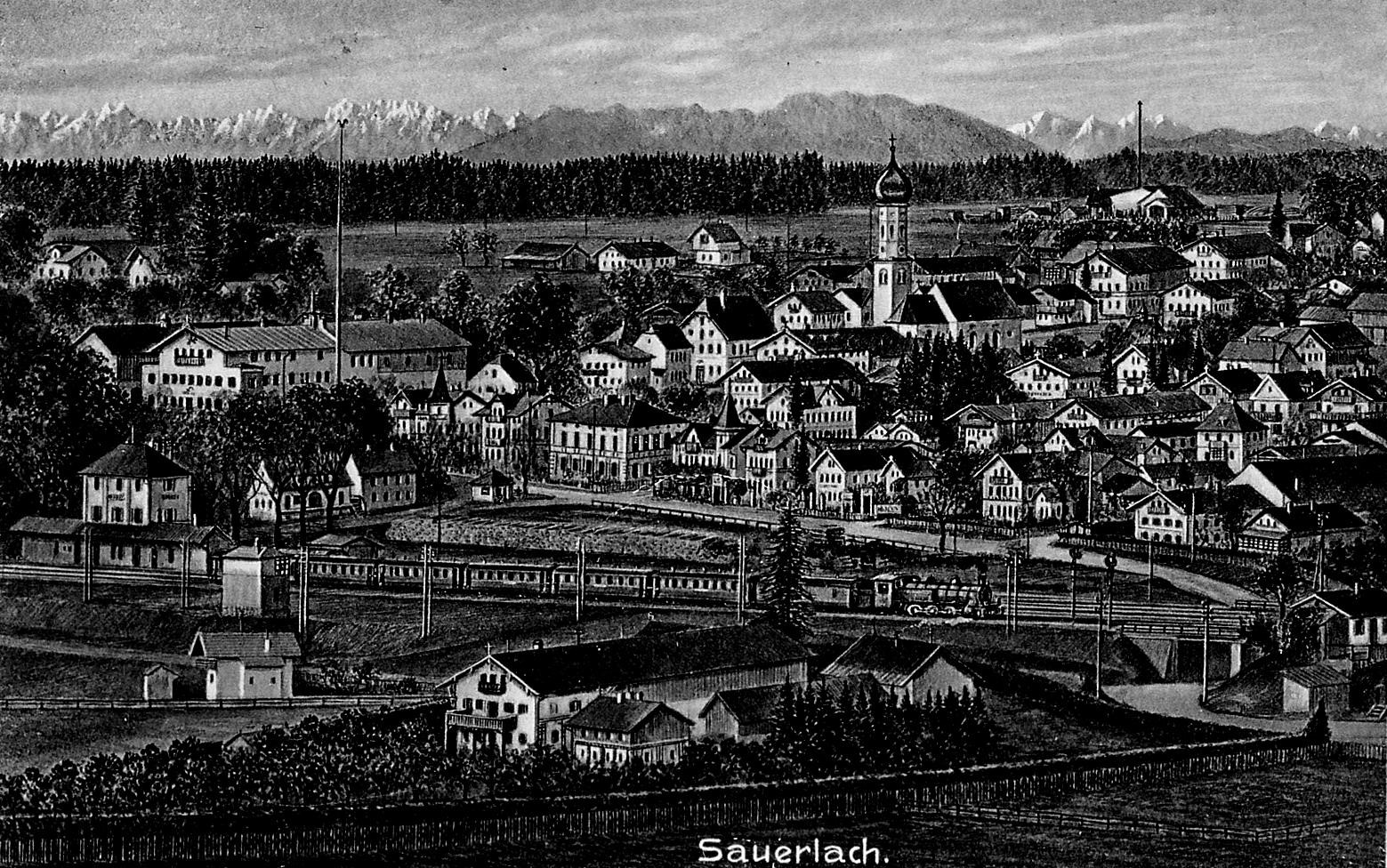 Postkarte aus Sauerlach